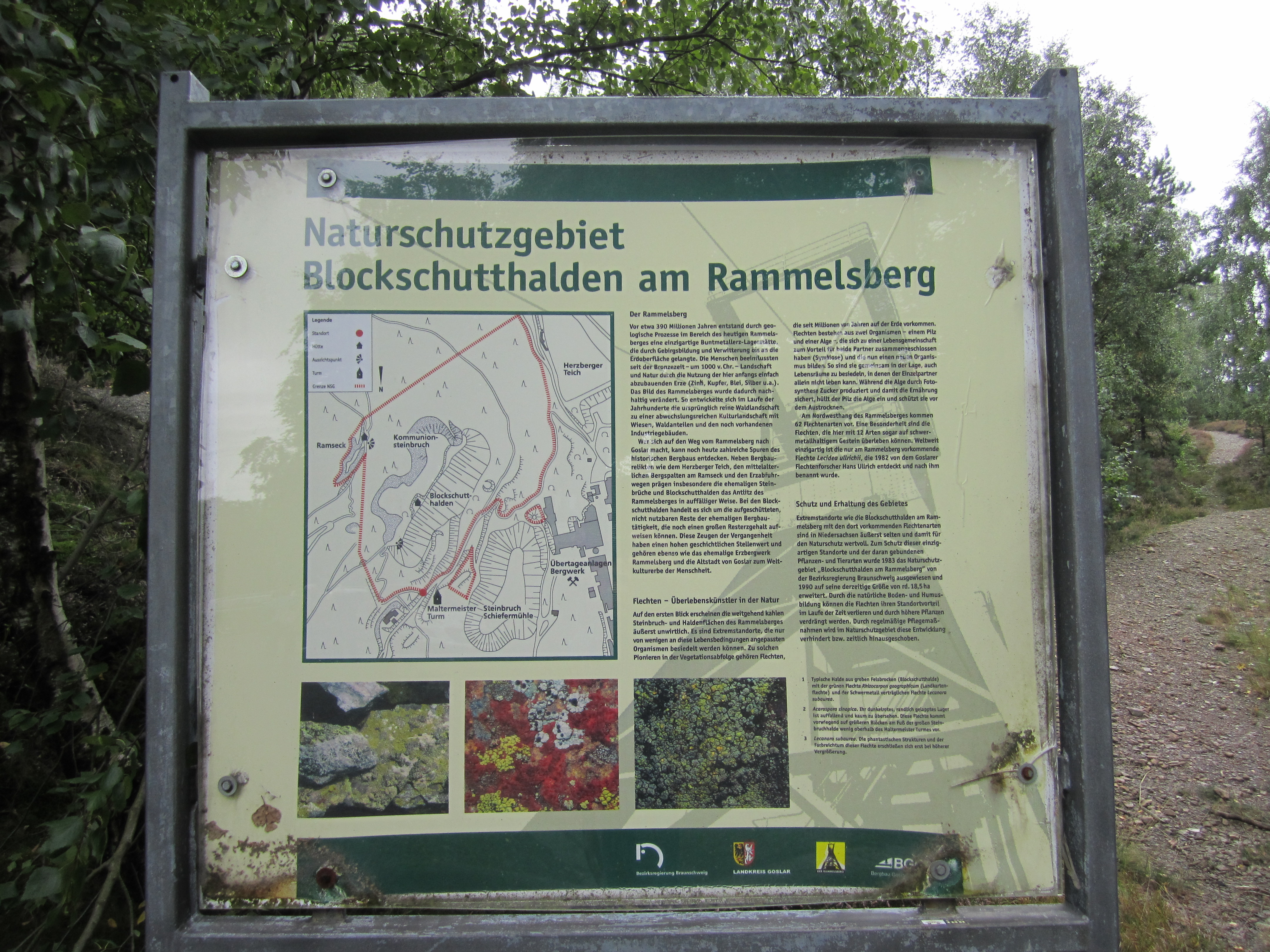 Imformationstafel Naturschutzgebiet „Blockschutthalden am Rammelsberg“. Rammelsberg, Goslar, Niedersachsen, Deutschland.